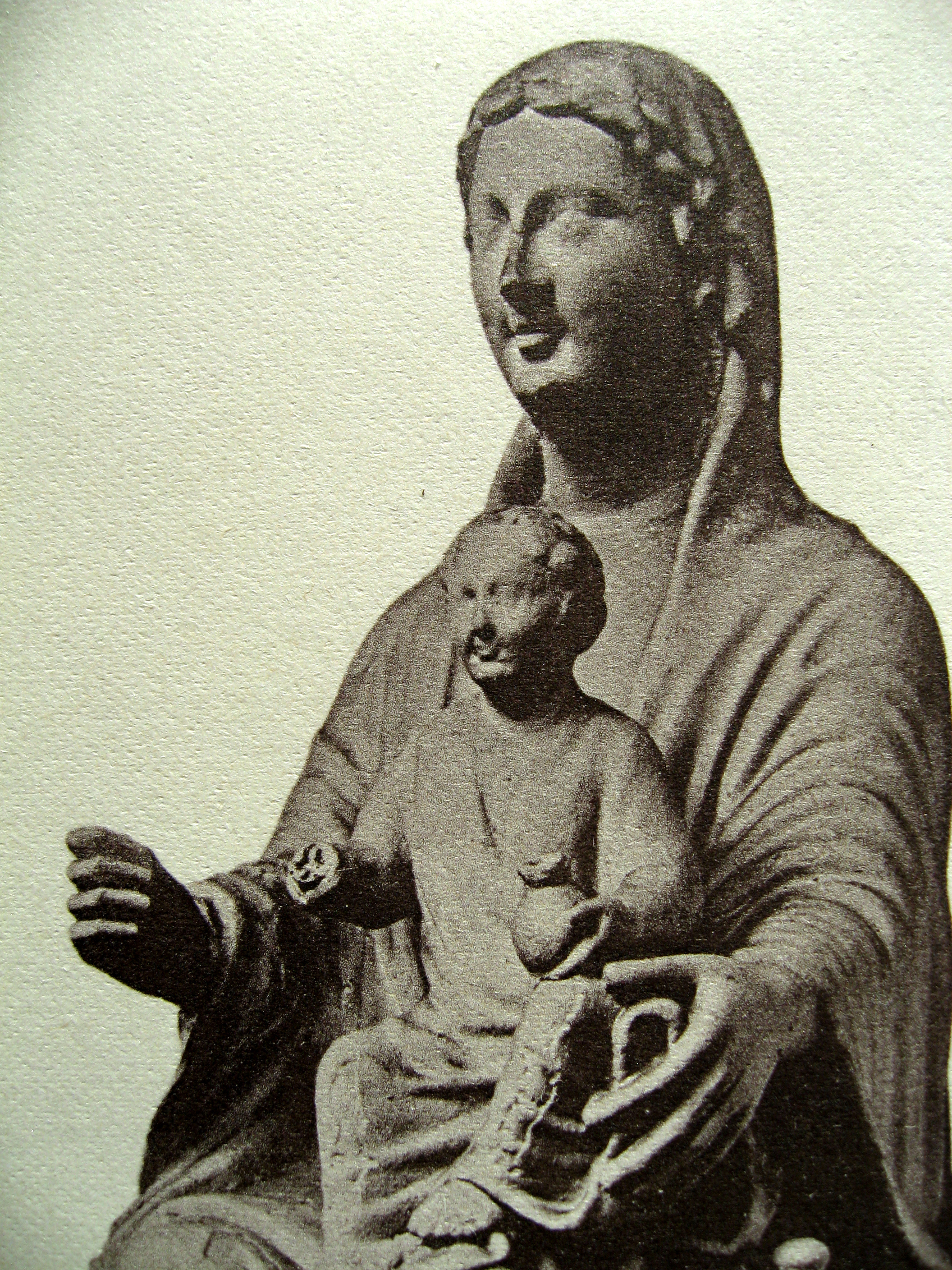 Marienkirche Dortmund 1890, Goldene Muttergottes von Dortmund